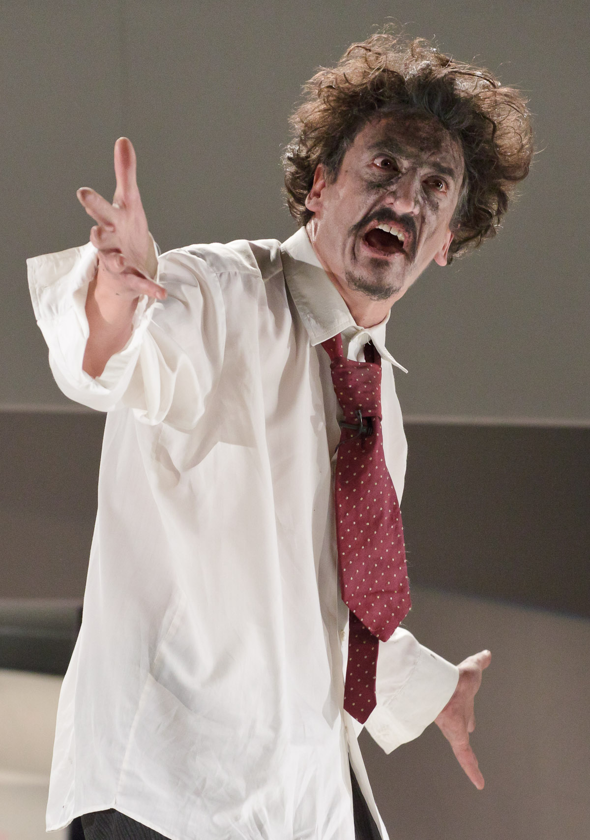 Pálffy Tibor a Fösvény című előadásban mint Harpagon. Sepsiszentgyörgy.